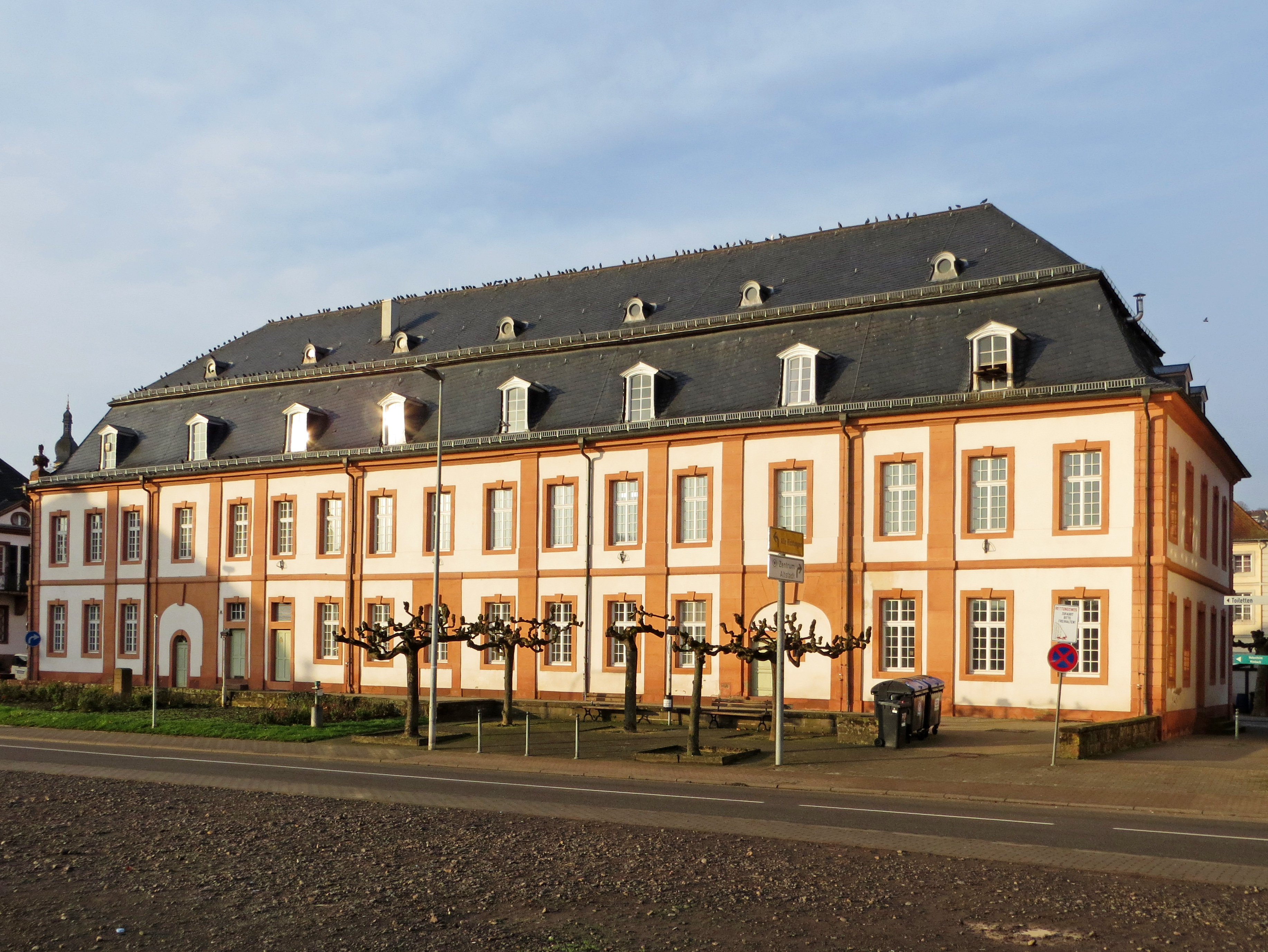 Ostseite des Rathauses der Stadt Blieskastel, Saarland.